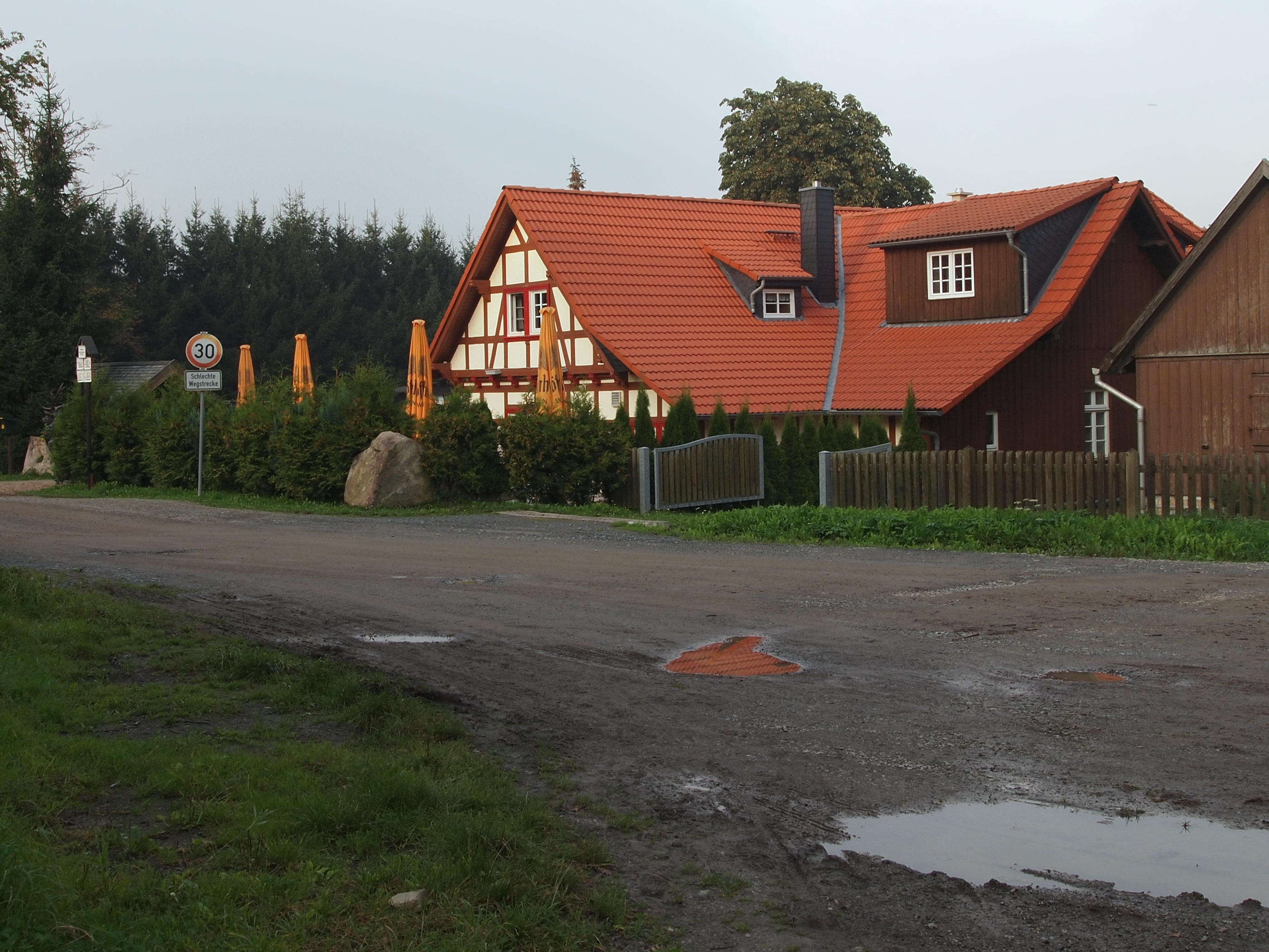 "Zum Alten Forsthaus Todtenrode" (Gasthof und Pension); nahe Altenbrak, Landkreis Harz, Sachsen-Anhalt